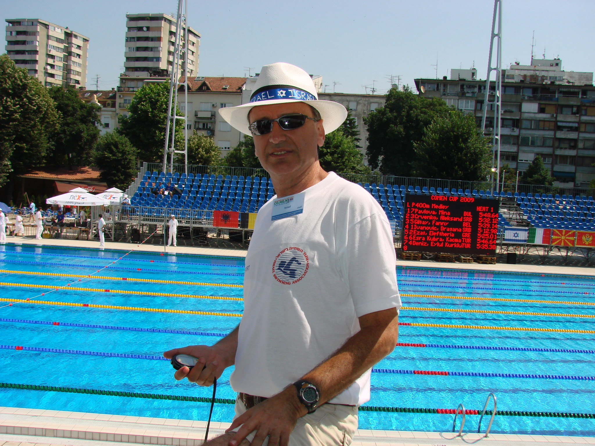 מאיר לויה, מאמן נבחרת ישראל גיל קדטים